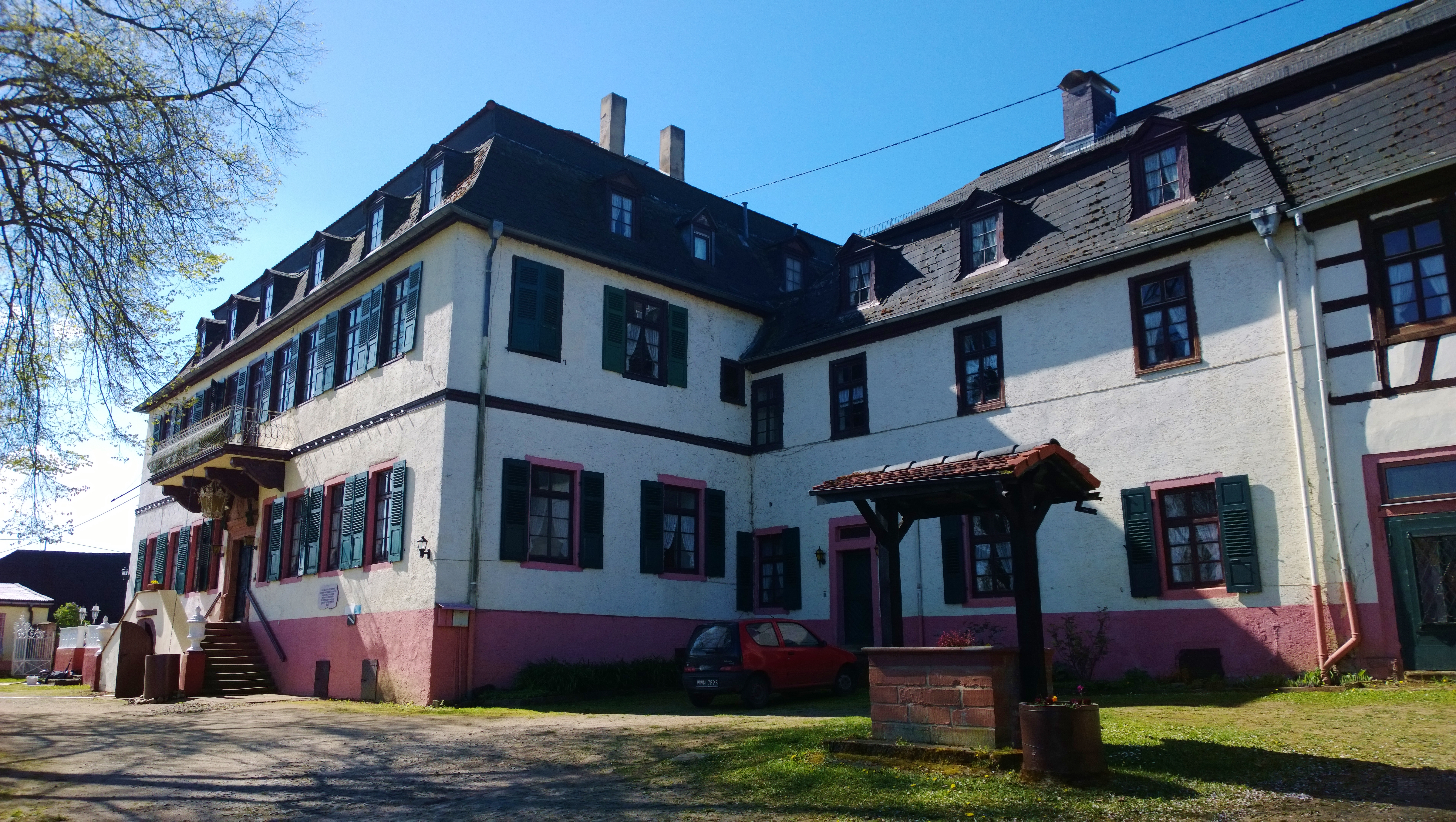 Schloss Günderrode: Haupthaus mit nördlichem Nebengebäude und überdachtem Brunnen